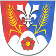 znak obce Vysoké Pole